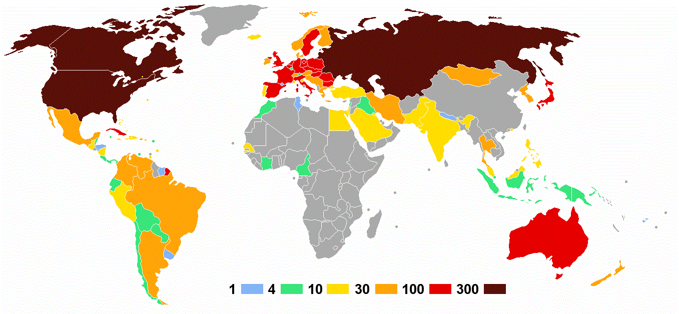 Olympische Sommerspiele 1976 — Anzahl der Athleten